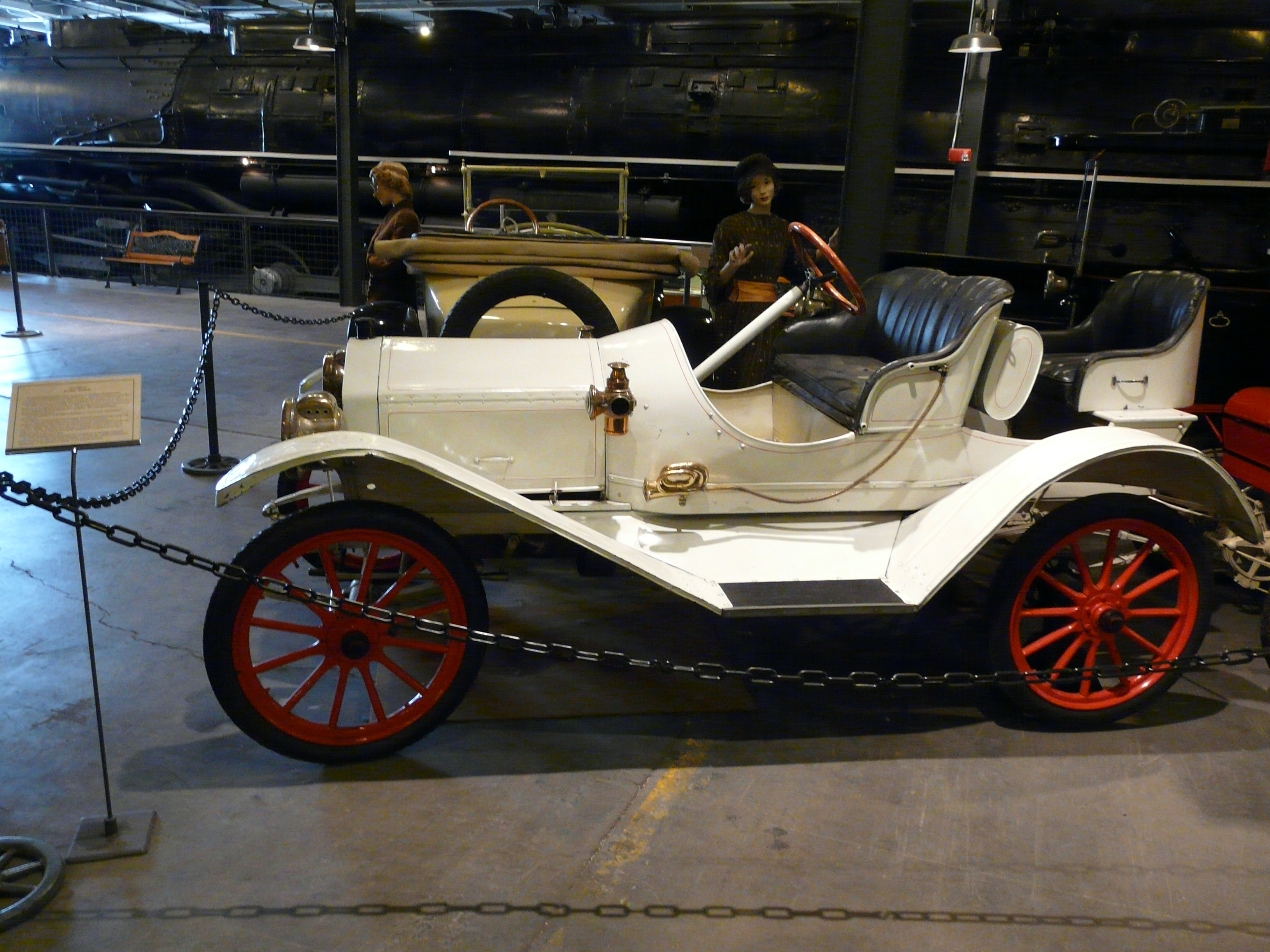 Metz Model 22 runabout (1912-1914); Denver, summer 2012